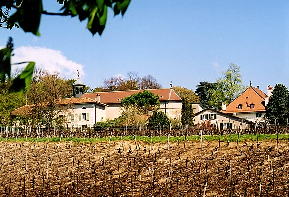 Blick auf Satigny, im Vordergrund ein Rebberg, April 2001